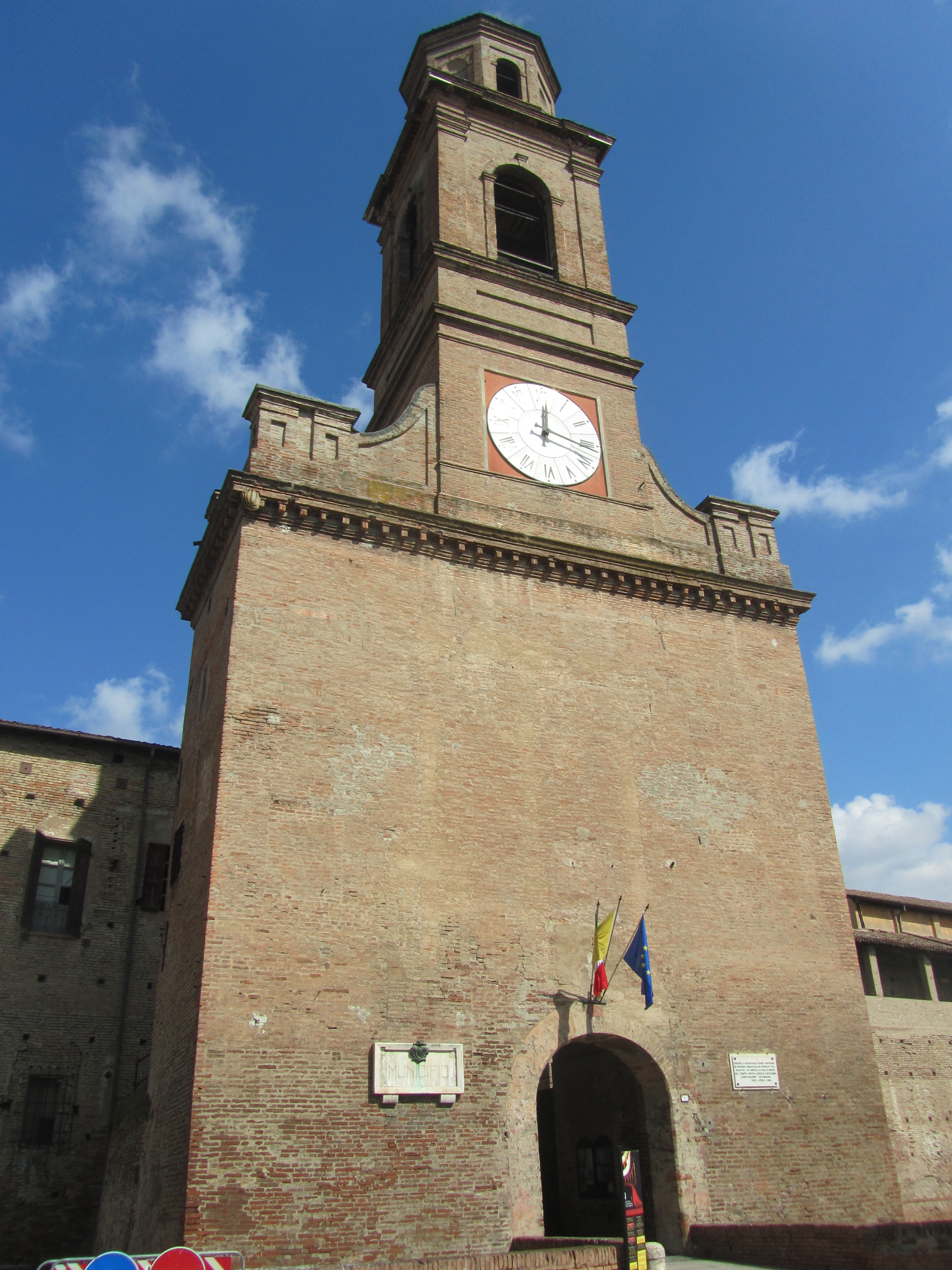 Torre di vedetta della rocca di Novellara, provincia di Reggio nell'Emilia.